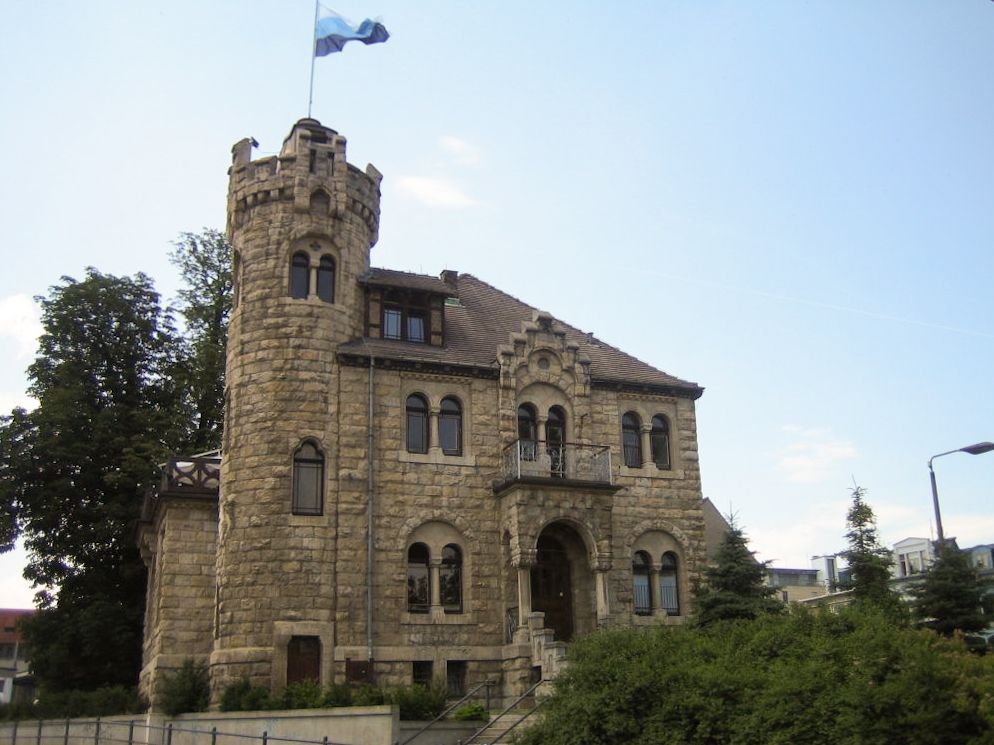 Koporationshaus des Corps Saxonia zu Jena im KSCV